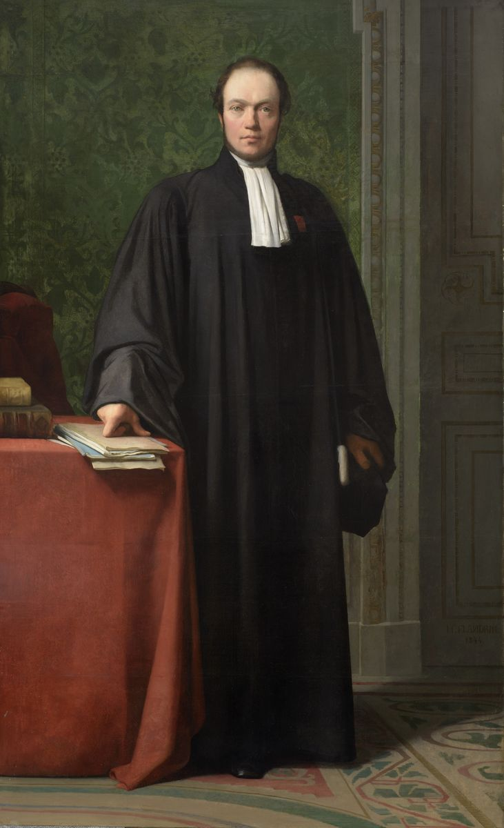 Peinture